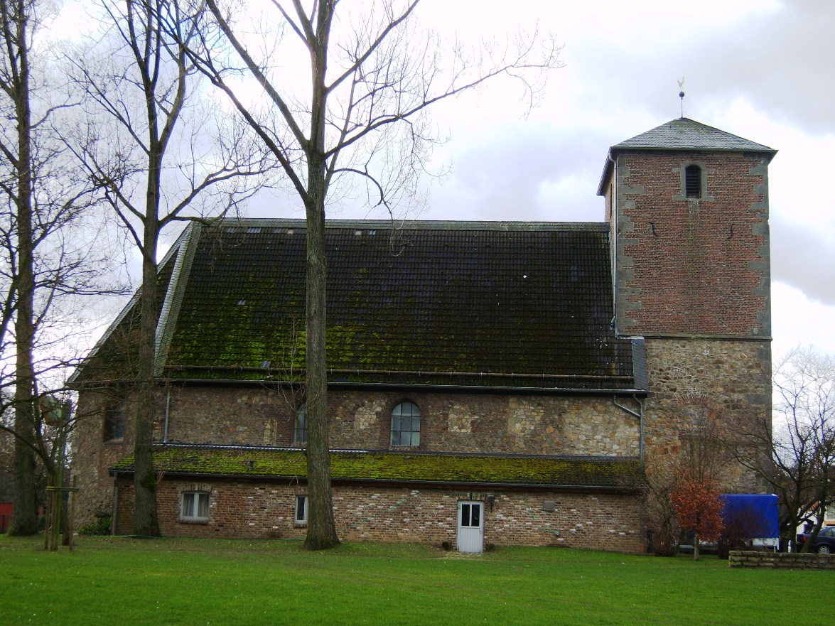 Eschweiler-Sankt Jöris: Zisterzienserinnenkloster Längsseitenansicht der Kapelle